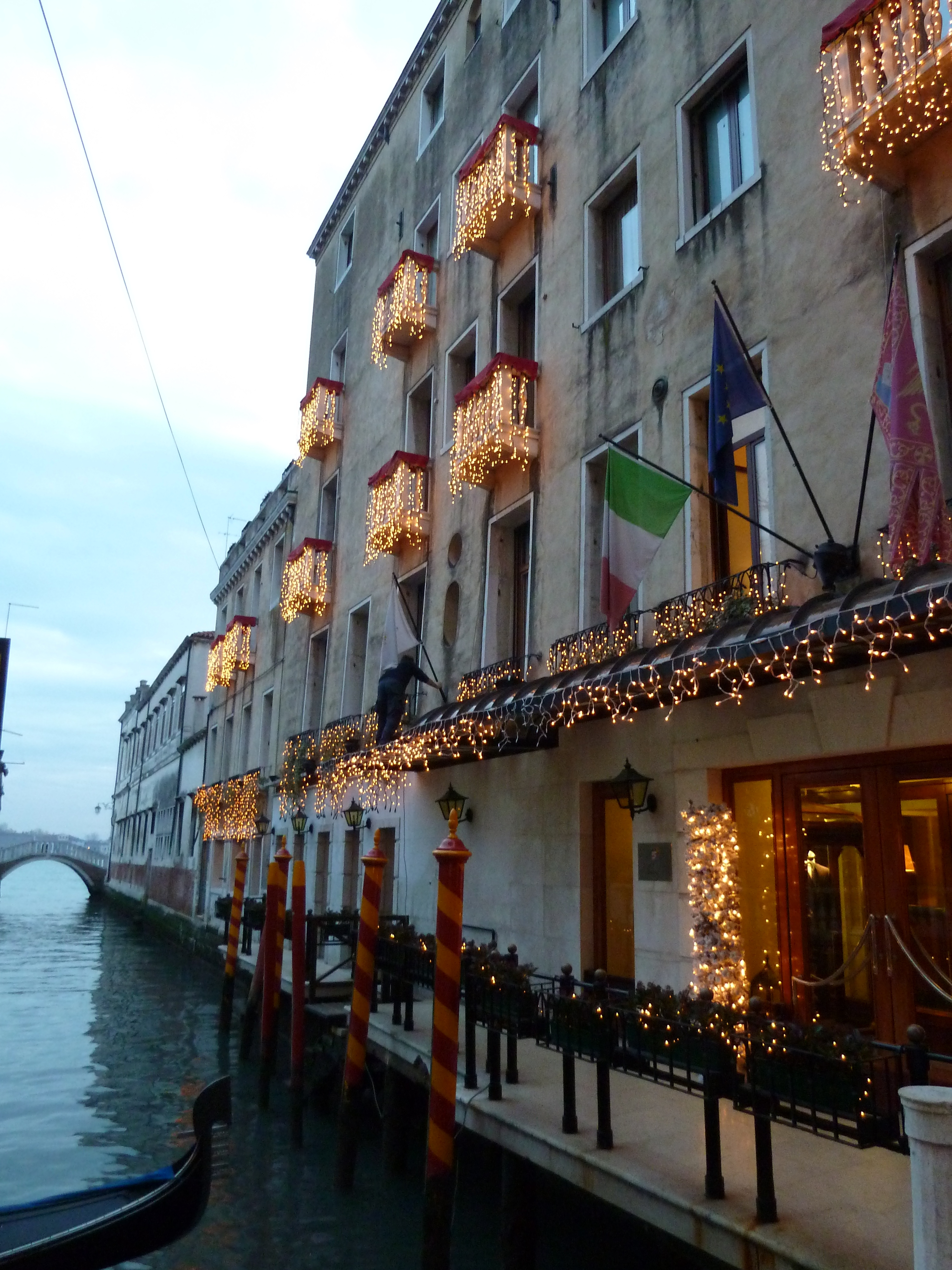 Hotel Luna Baglioni (Venice)